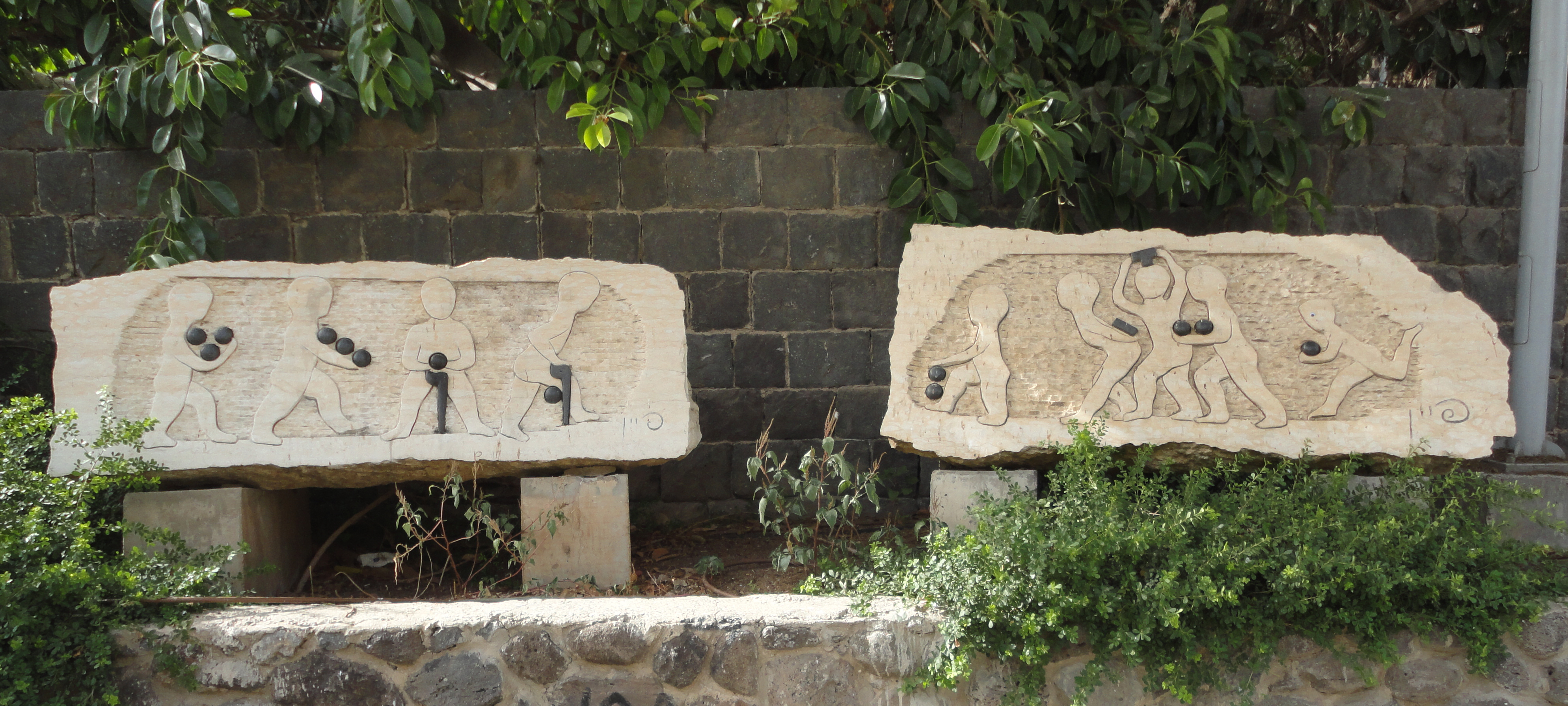 דוד פיין ישראלי, נולד בדרום אפריקה ב-1928 ניקוד טברייני 2008 אבן גיר המוזיאון הפתוח טבריה, טבריה